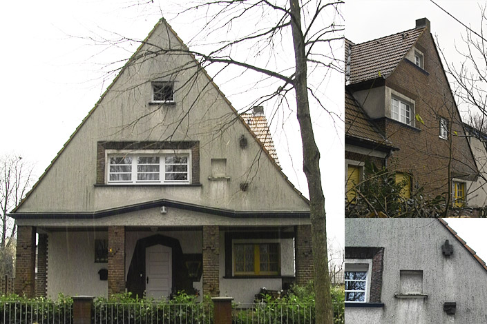 Wohnhaus, erbaut von Josef Franke in Gelsenkirchen-Bulmke (1925)